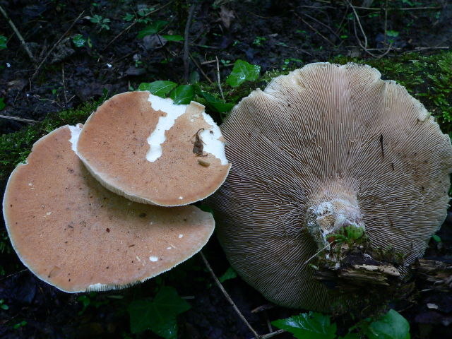 Becherförmiger Sägeblättling (Lentinus cyathiformis) Fotografiert von DGFM-Forumsnutzer Alis 2008, freigegeben für Wikipedia hier: Bildquelle